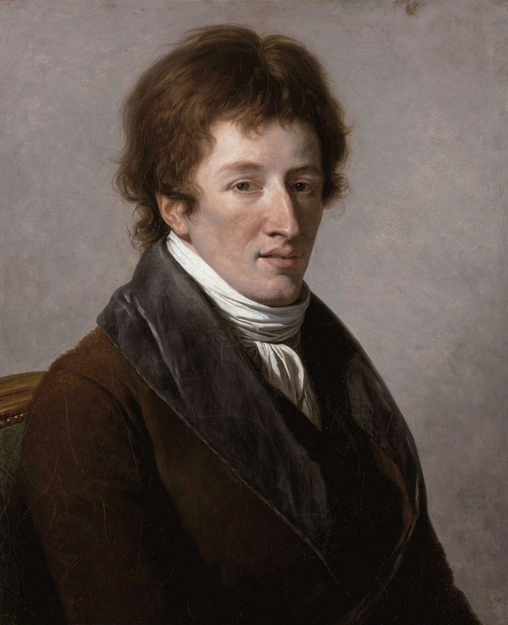 Baron Georges Cuvier (1769-1832)